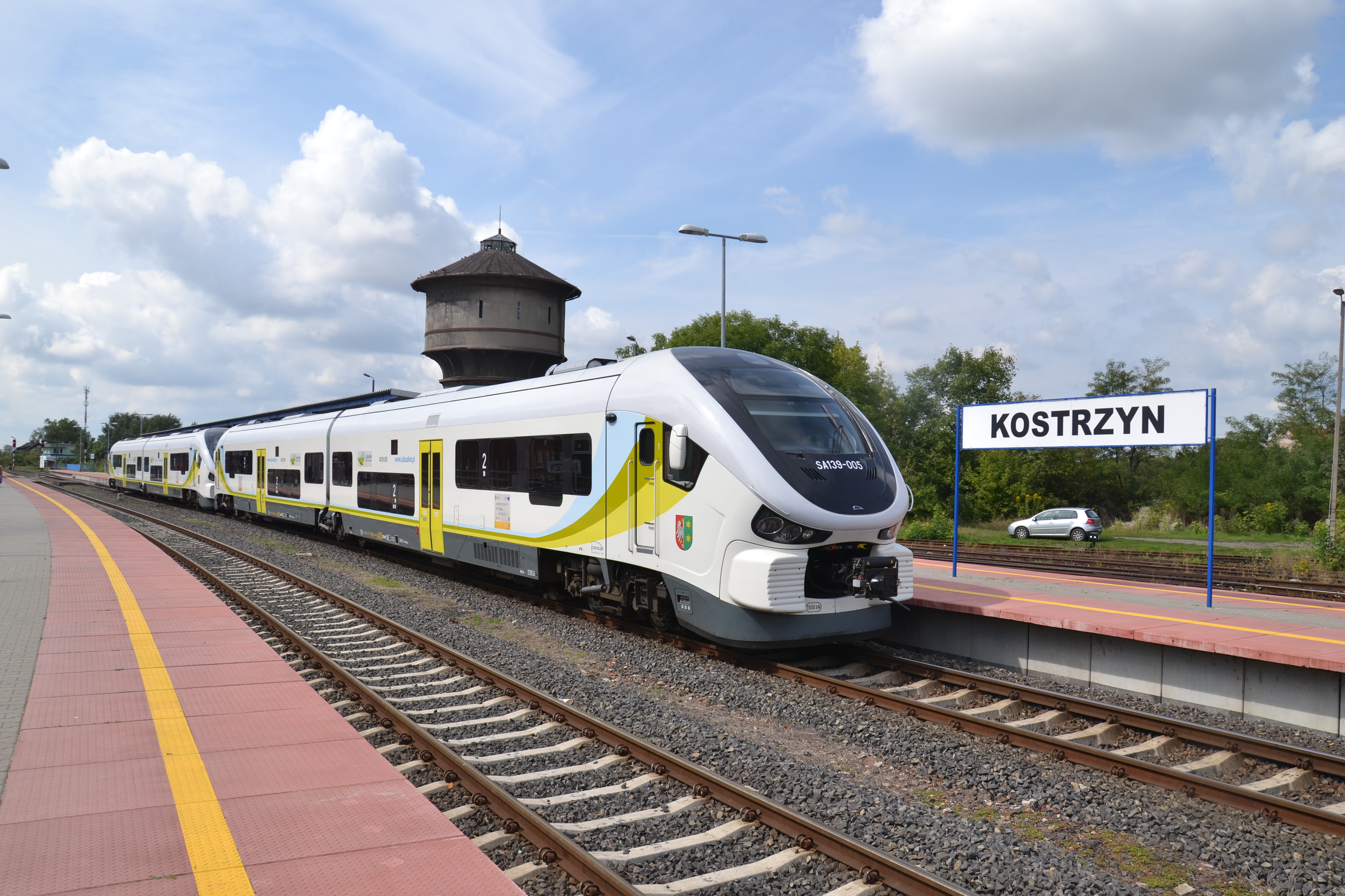 SA139-005 i SA139-? na stacji w Kostrzynie nad Odrą